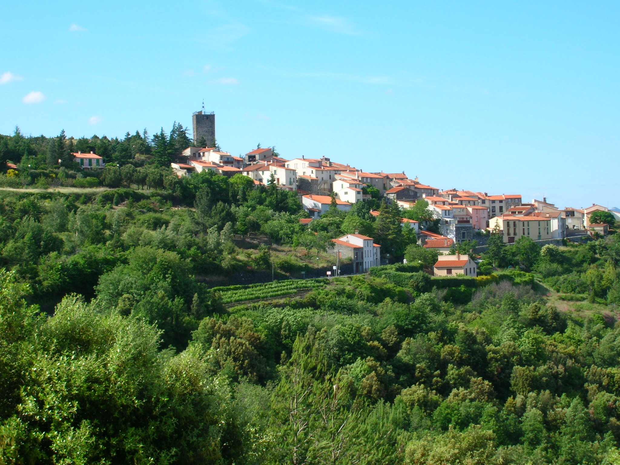 La commune de Prats-de-Sournia dans les Pyrénées-Orientales